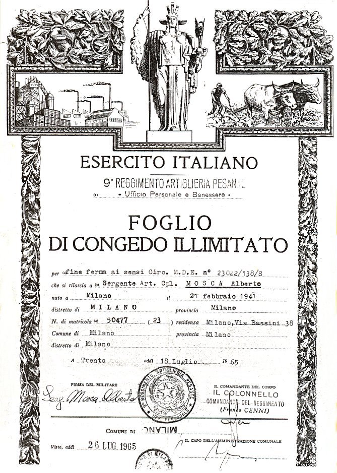 Foglio di congedo illimitato per fine ferma che si rilascia al sergente Art. Cpl. Mosca Alberto nato a Milano il 21-2-1941- distretto di Milano n. matricola 50477 (23) - residente a Milano in via Bassini, 38 - a Trento addì 18 luglio 1965